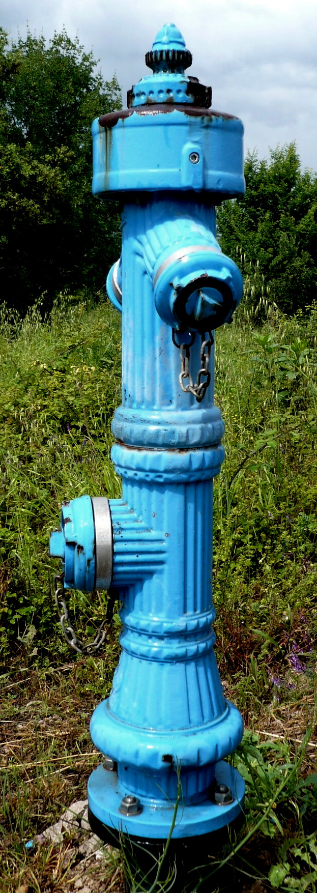 Hydrant auf der Insel Krk in Kroatien